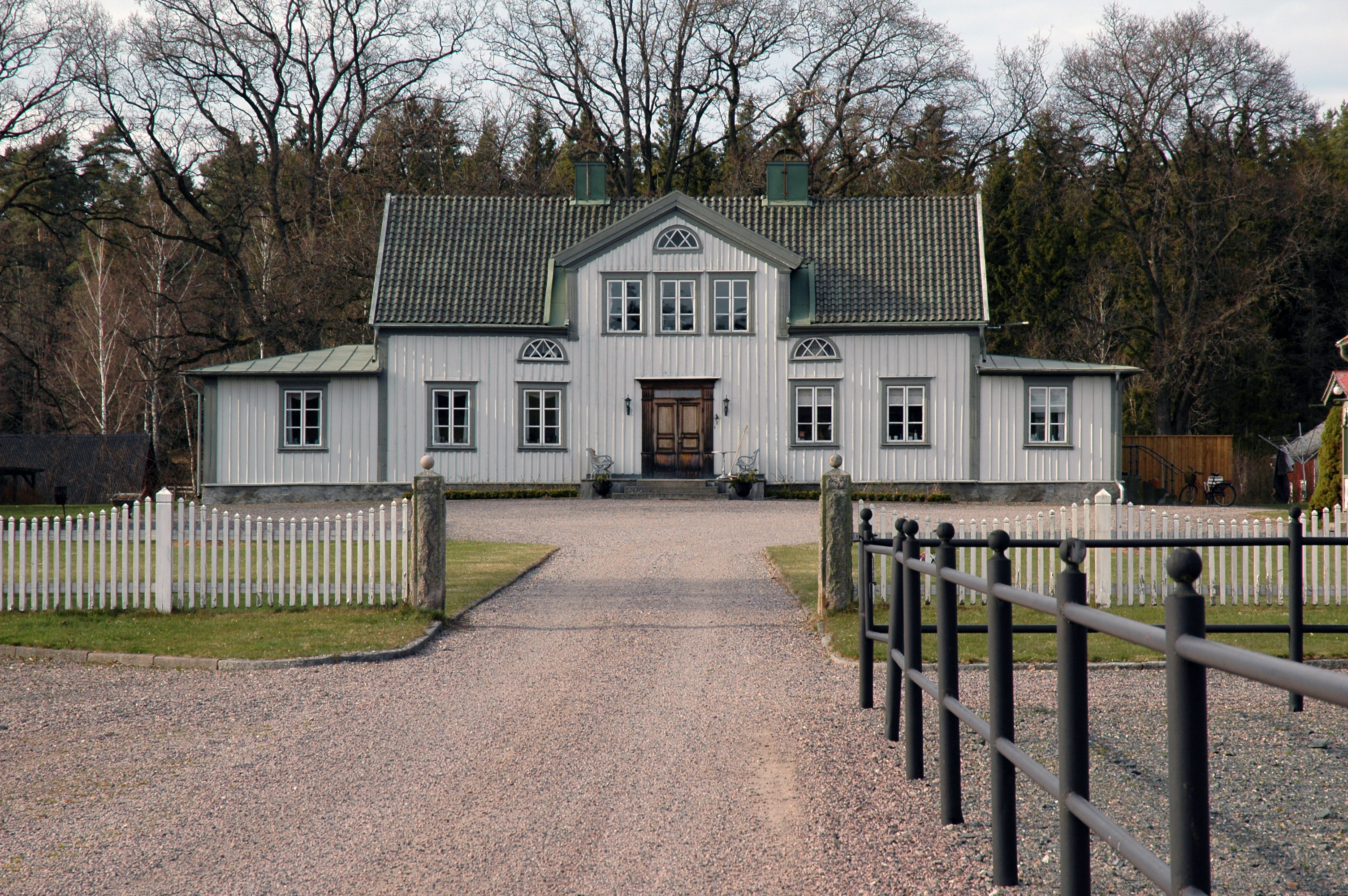 Gården Dalskog i Hakarps socken, Sverige